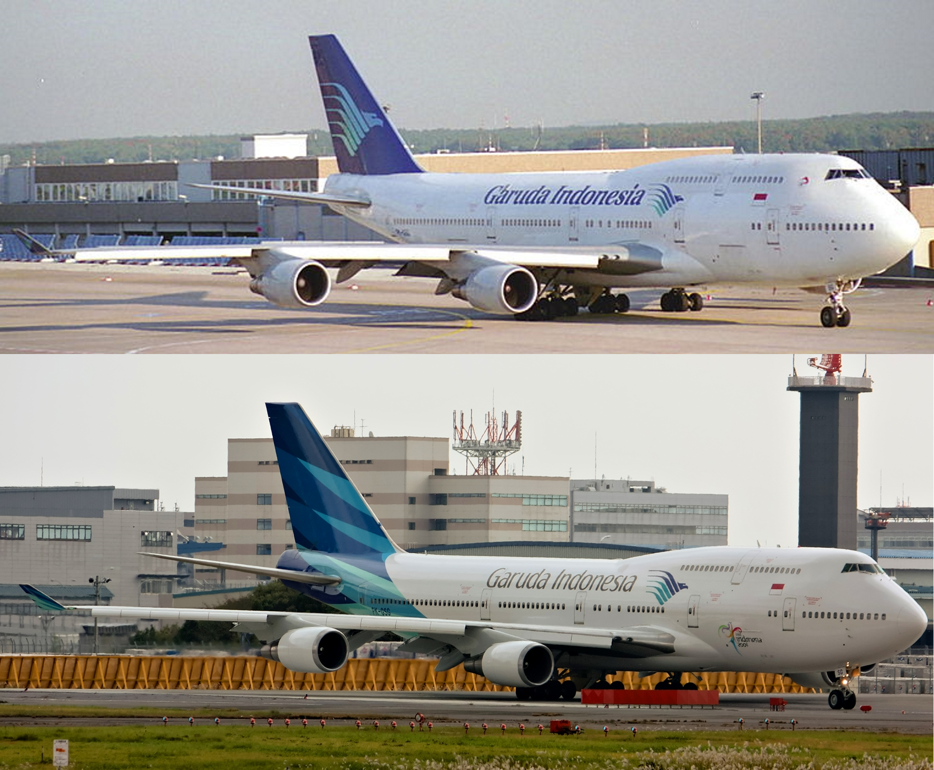 Vergleich zwischen alter Bemalung (oben) und neuer Bemalung (unten) des selben Flugzeugs PK-GSG